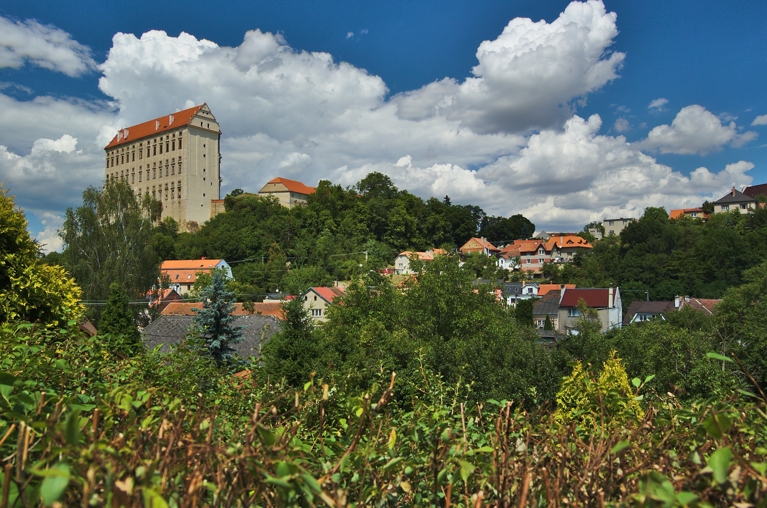 Zámek Plumlov, okres Prostějov